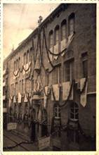 Foto feta pel meu rebesavi de l'escola Sagrat Cor de Jesús